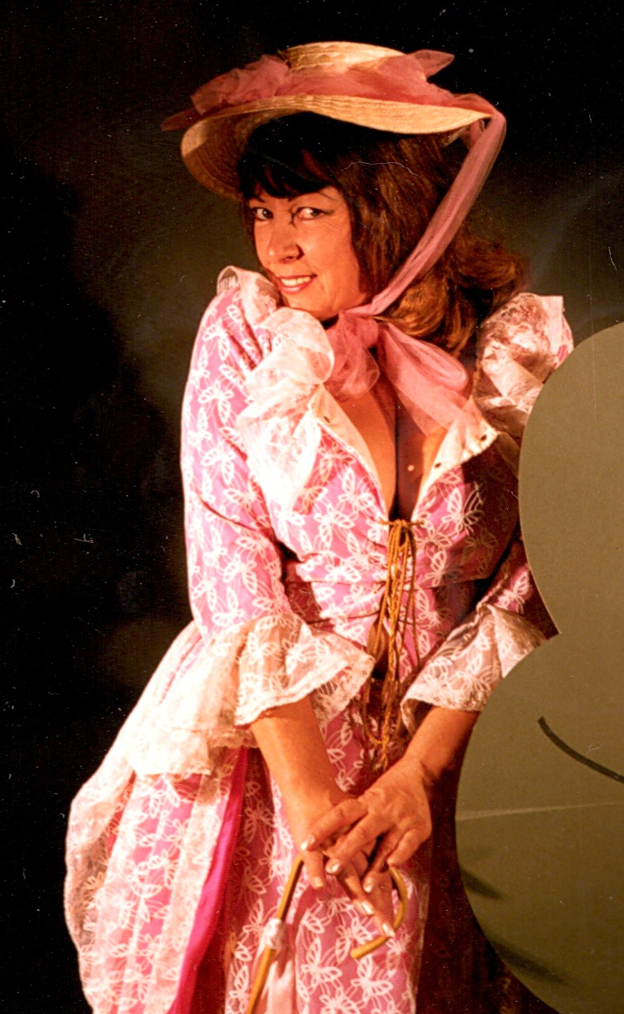 June Palmer